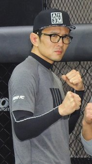 XTM 주먹이운다 시즌3 영웅의탄생 현장인터뷰